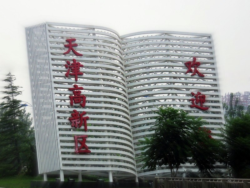 天津滨海高新区欢迎牌